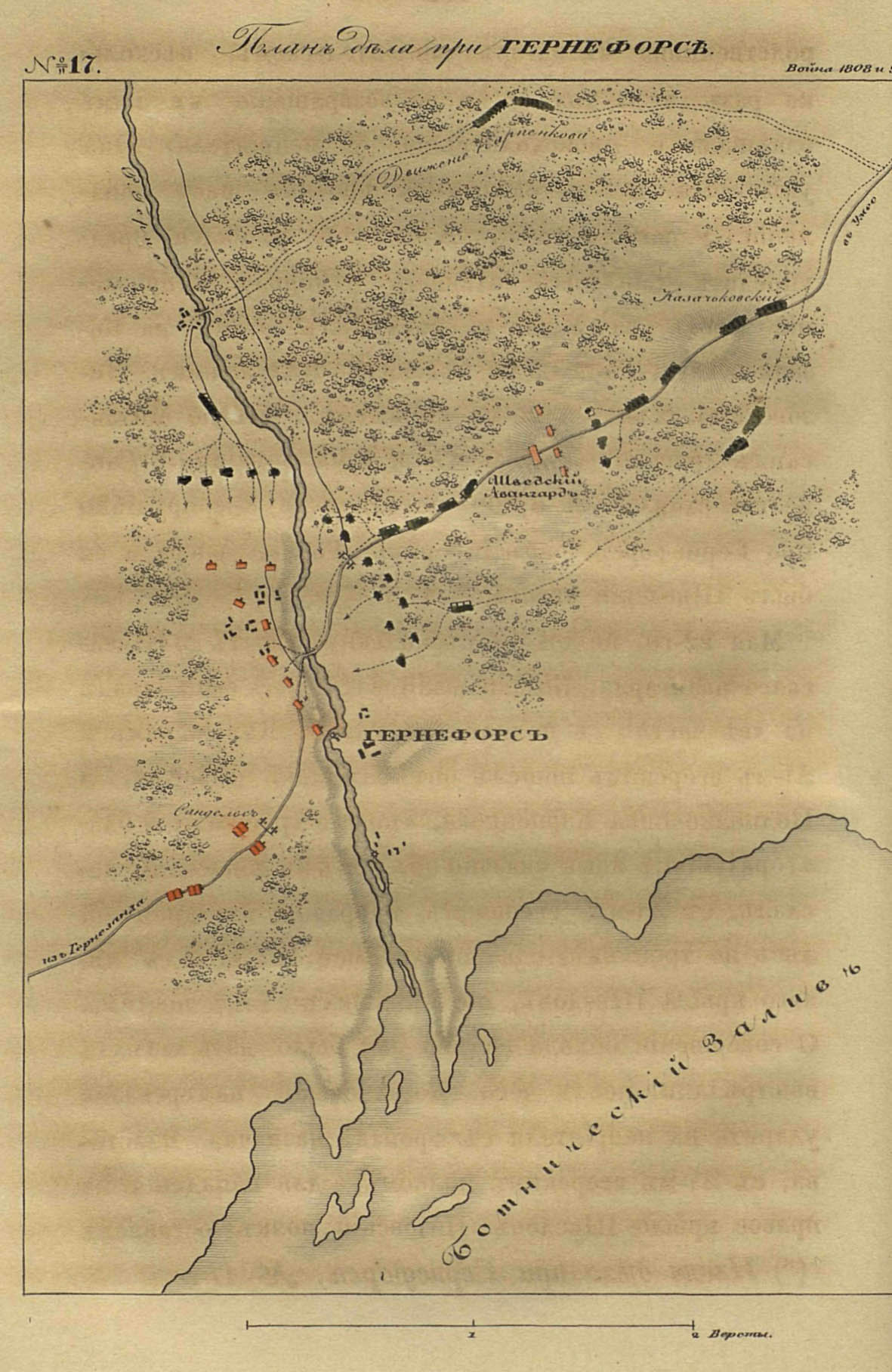 План сражения при Хёрнефорсе